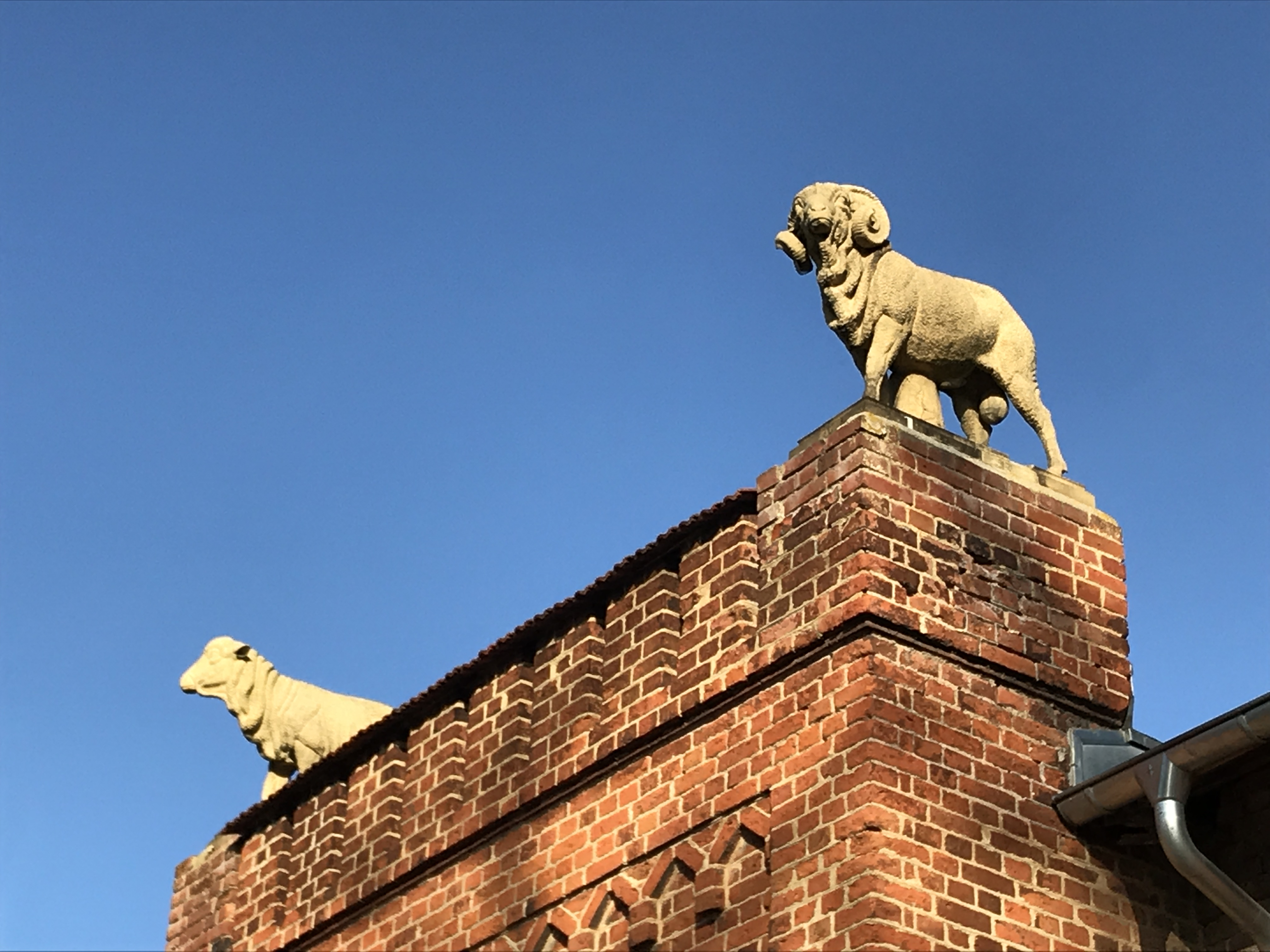 Denkmalgeschützter Schafstall in Niebendorf, gemeinsam mit Heinsdorf ein Ortsteil von Dahme/Mark in Brandenburg